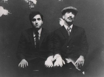 Cezmi Baskın AST'ta oynanan Sacco ile Vanzetti oyununda